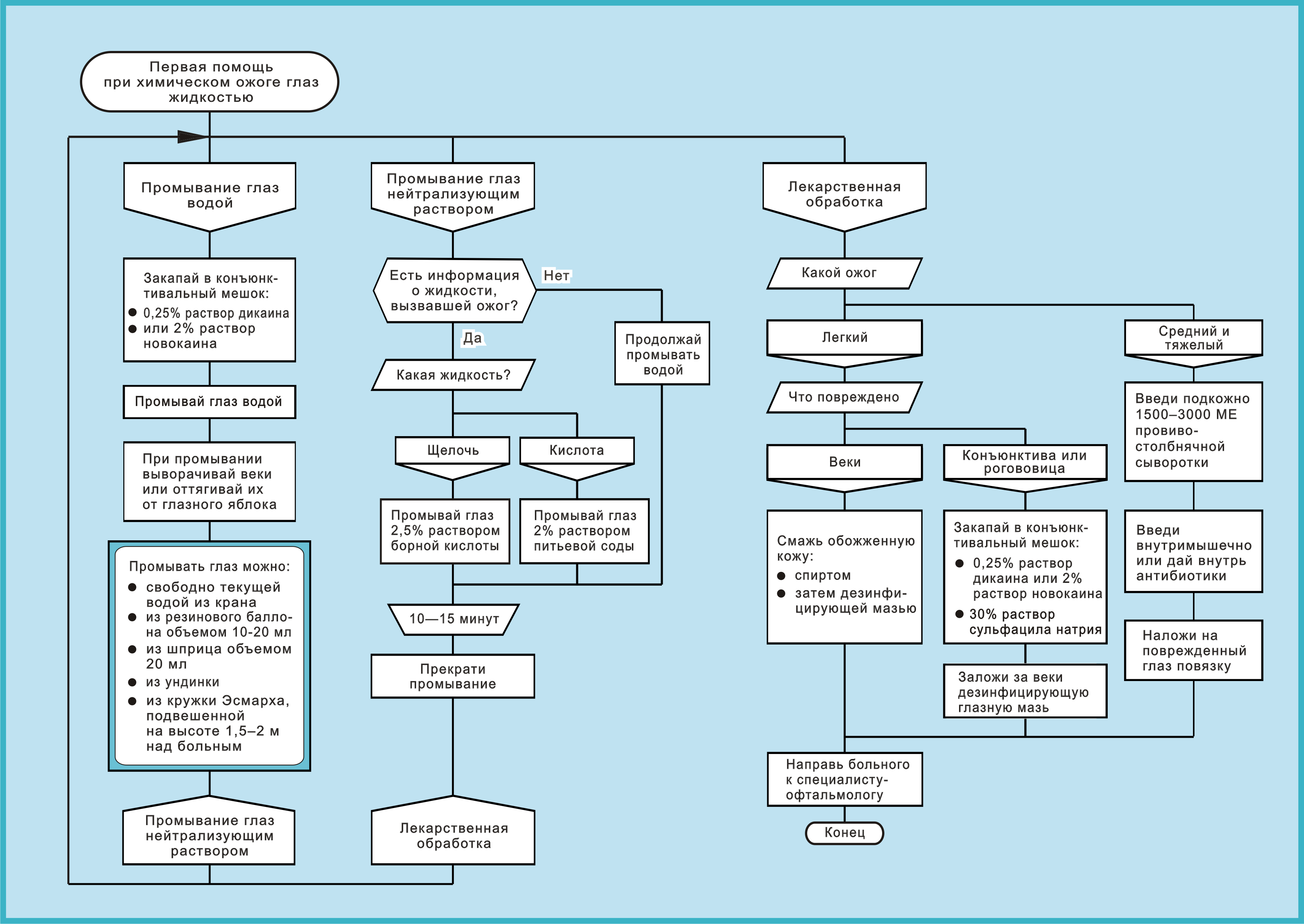 Первая помощь при химическом ожоге глаз для случая, когда ожог вызван жидкостью